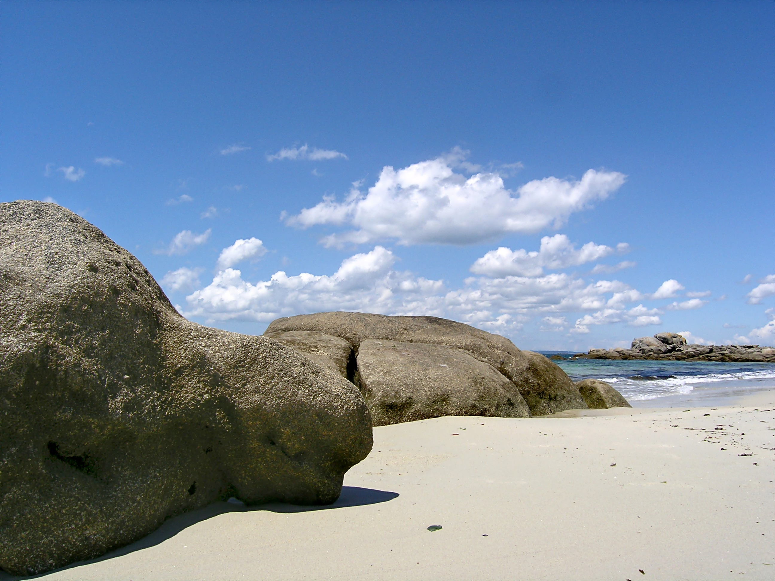 Beach near Trévignon (Trégunc, fr)